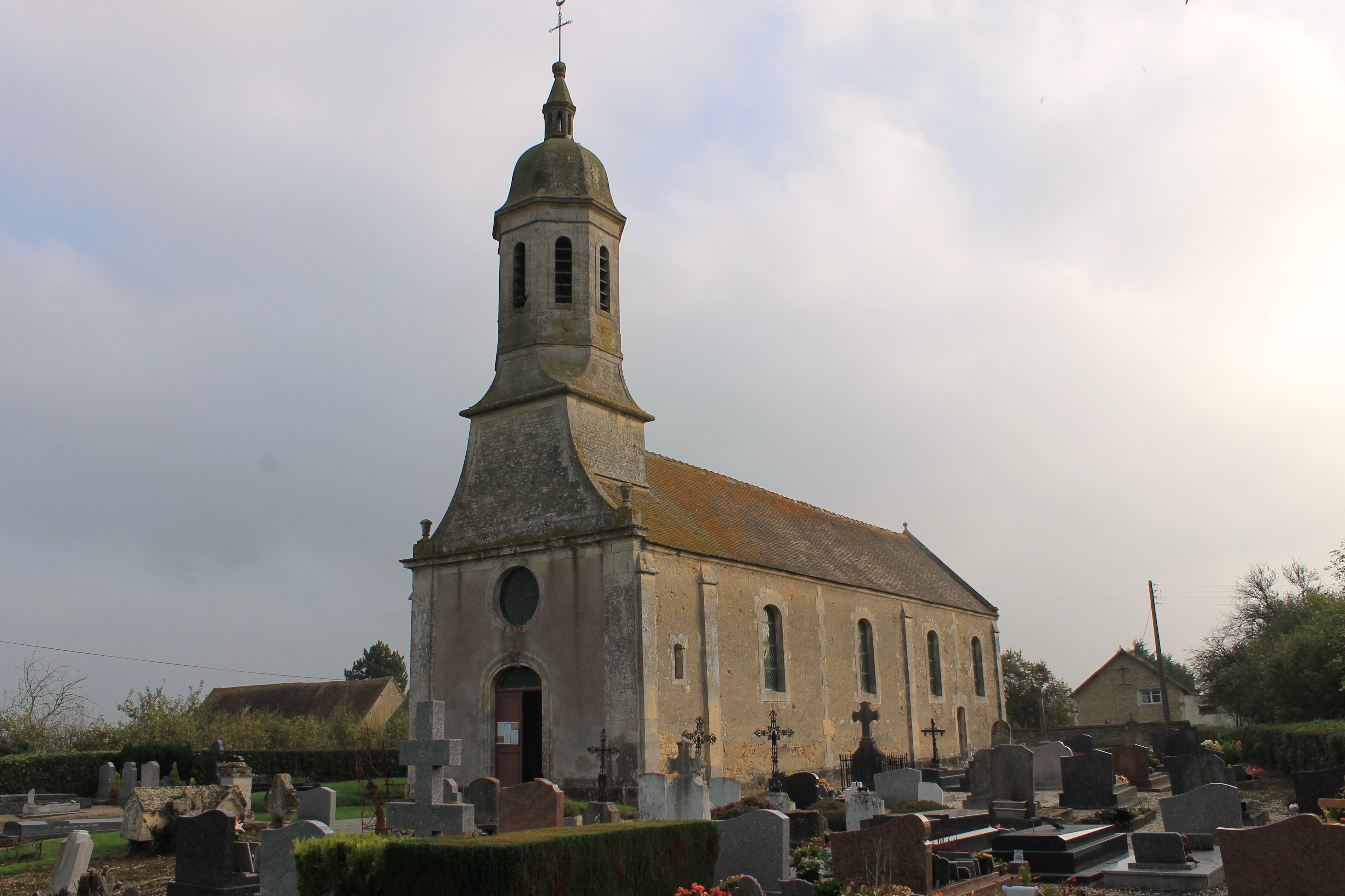 Eglise Saint-Pierre à Saint-Pierre-du-Jonquet (Calvados)